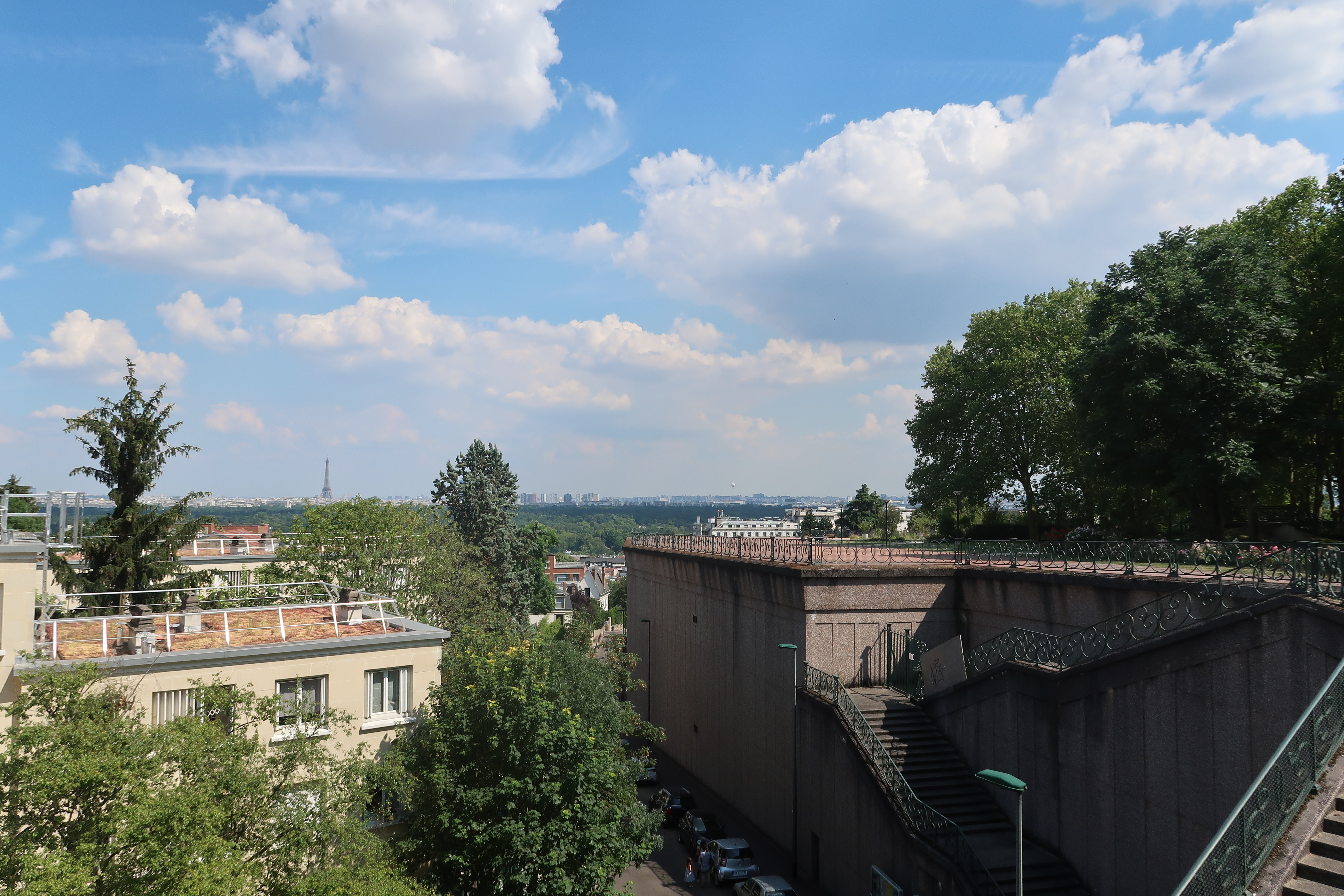 Terrasse du Fécheray à Suresnes (Hauts-de-Seine).